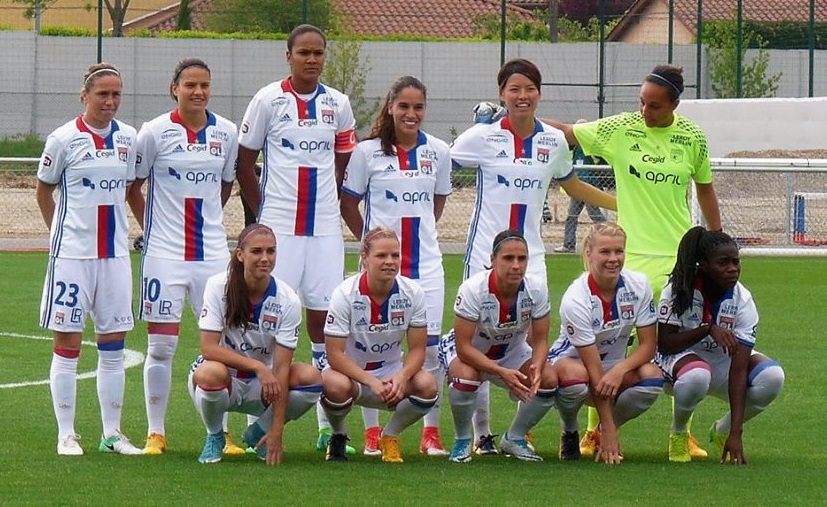 Effectif titulaire de l'Olympique lyonnais contre Soyaux lors de la 20ème journée de championnat le 8 mai 2017.